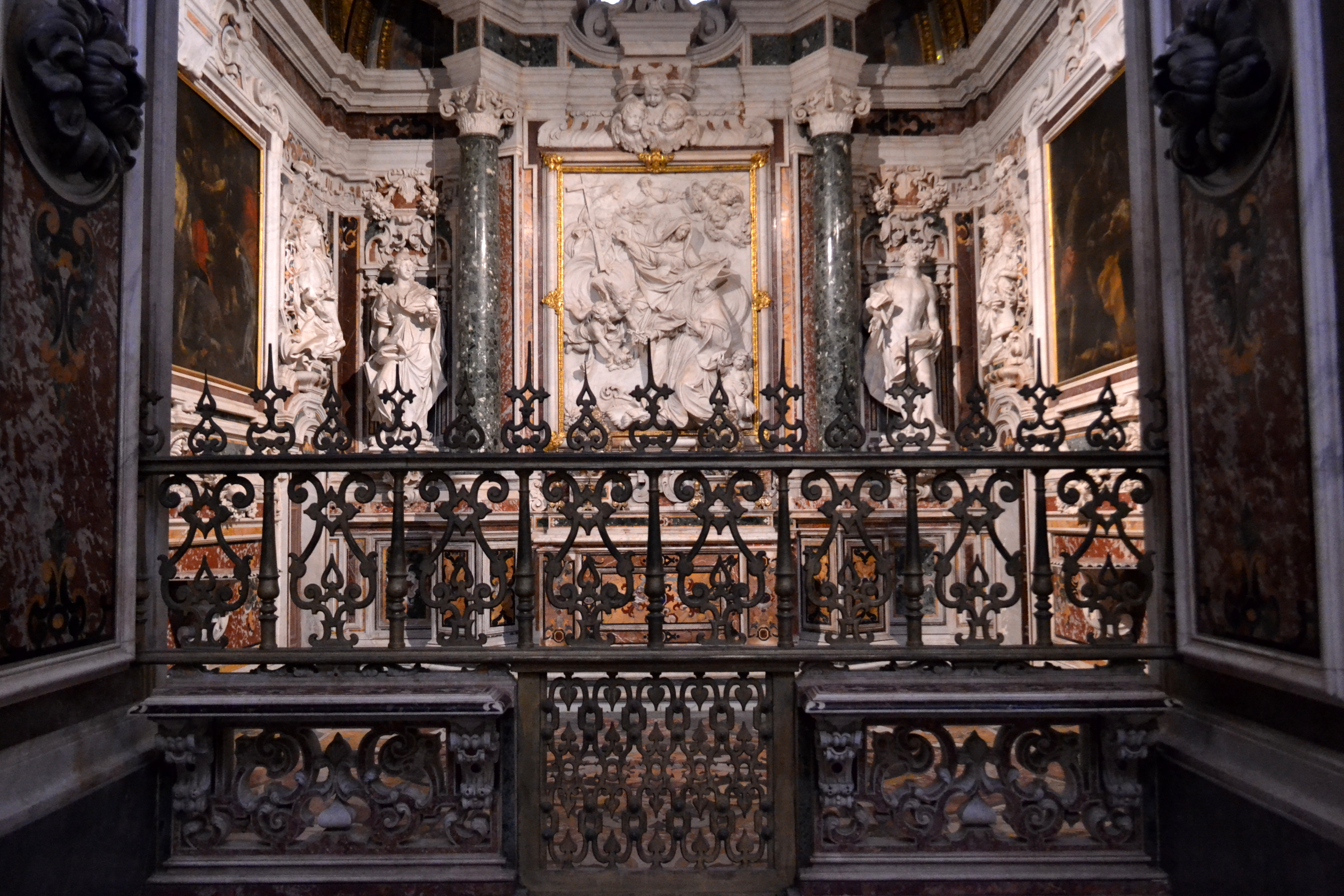 Certosa di San Martino (Napoli) - Cappella di San Gennaro